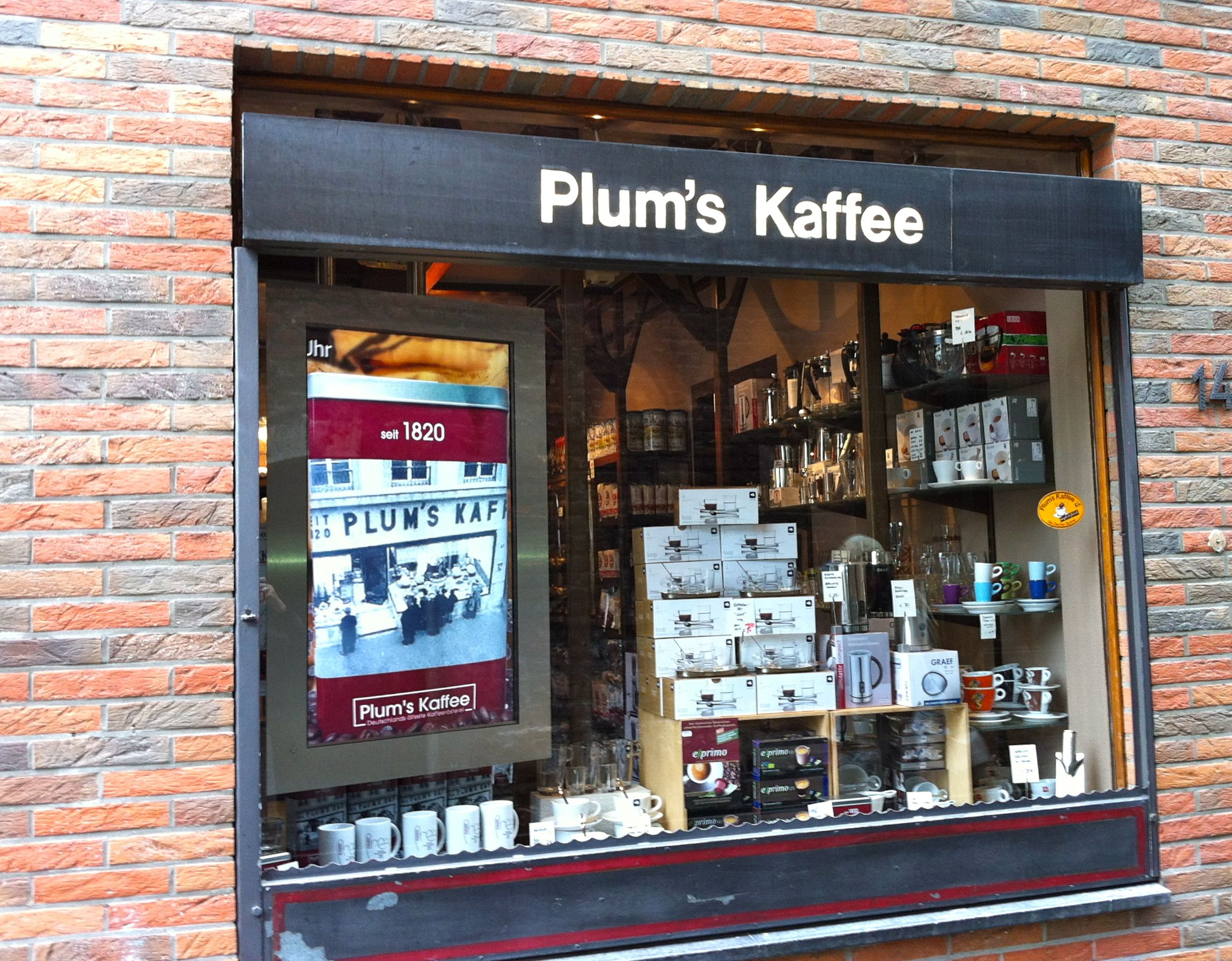 Plum's Kaffee, Ladengeschäft in der Körbergasse in Aachen